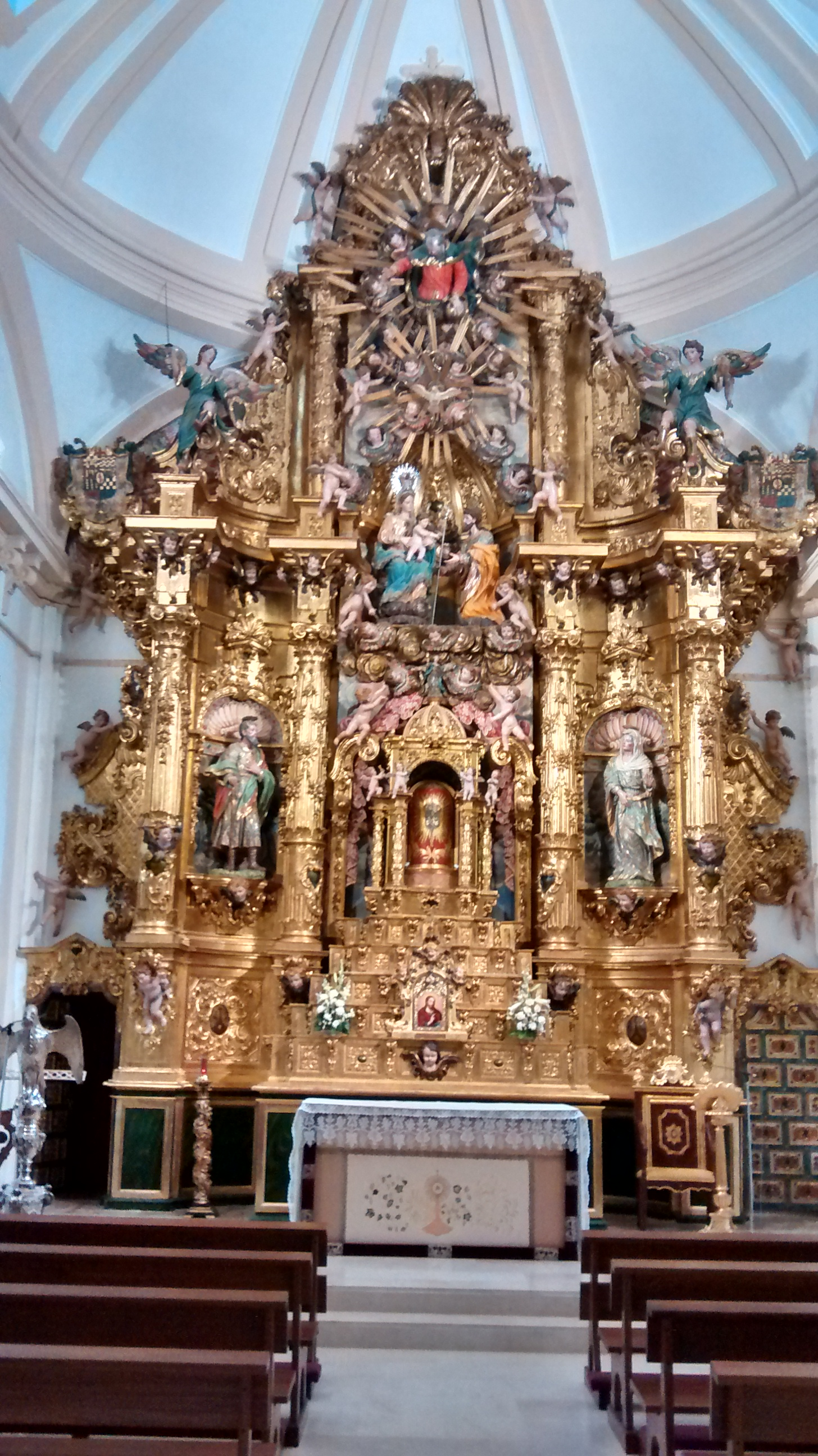 Retablo de la Trinidad del convento de San José (Malagón)